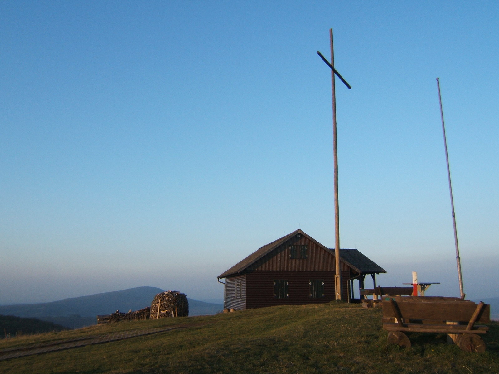 Dermbacher Hütte auf dem Gläserberg, Rhön, Deutschland